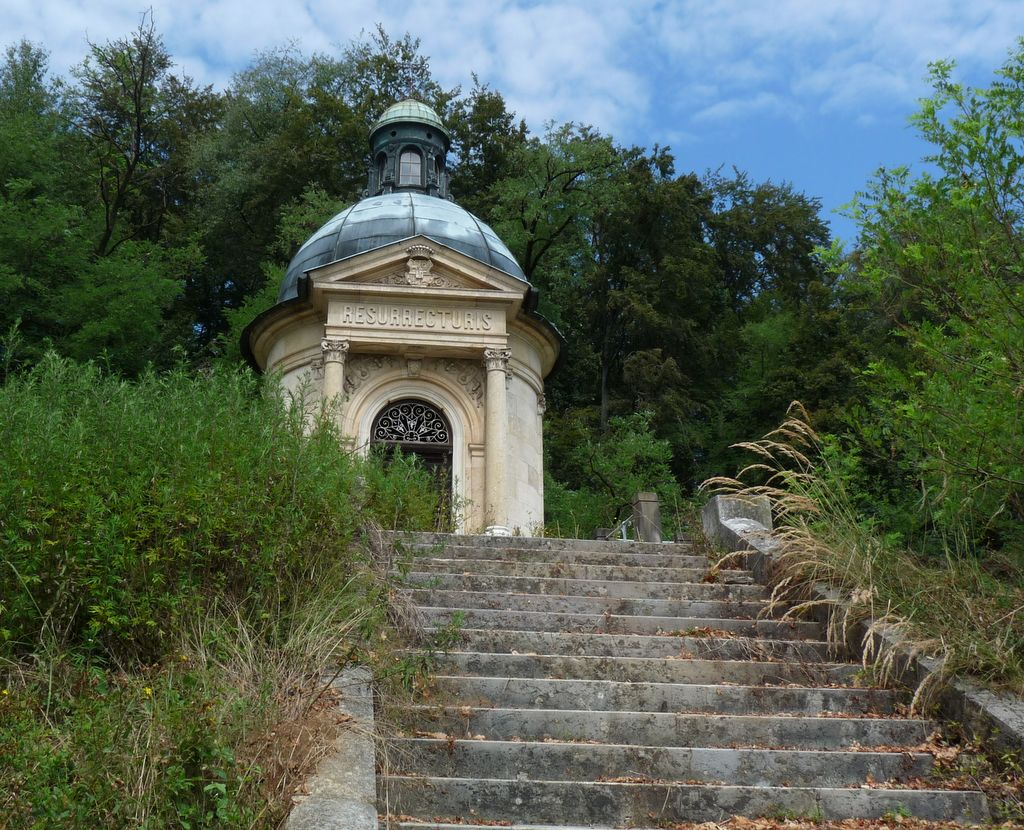 Mavzolej Anastazija Grüna (grofa Antona Aleksandra Auersperga)